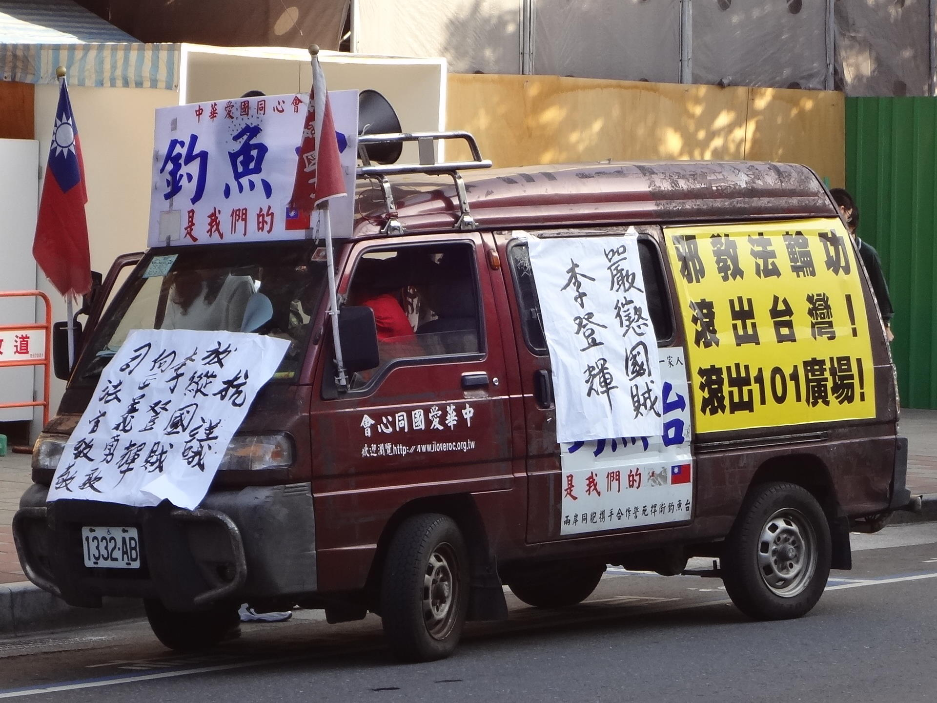 中華愛國同心會的中華威利1200廂型車1332-AB。